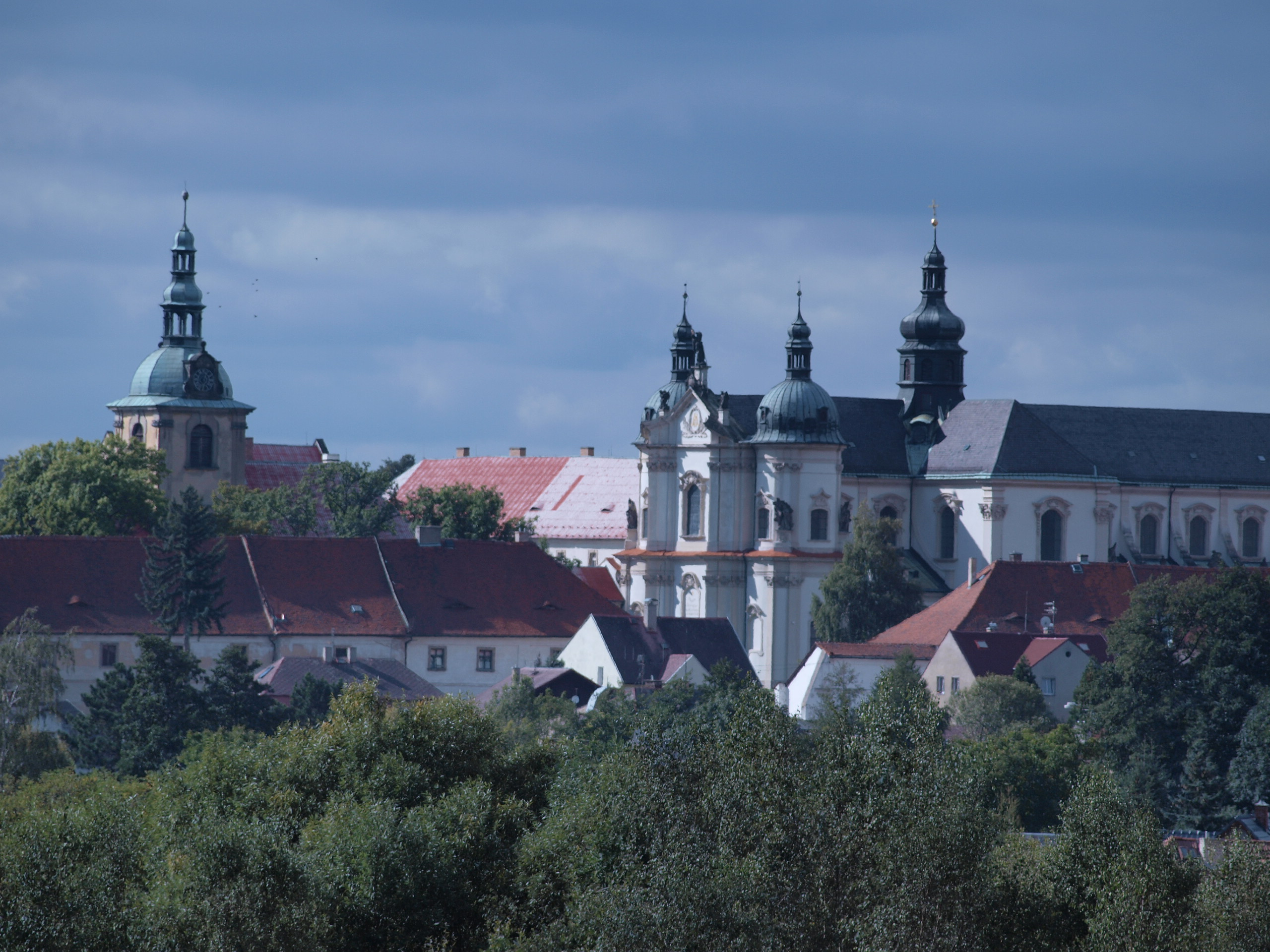 Pohled ze severní strany